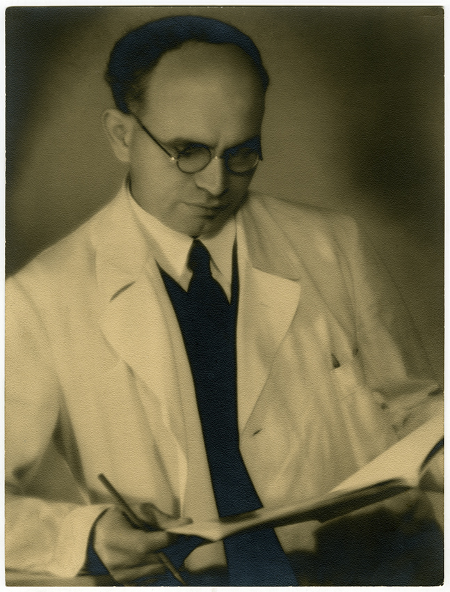 Portrétní fotografie pedagoga, výtvarníka a komunálního politika Jaroslava Dobrovolského ze 30. let 20. století.